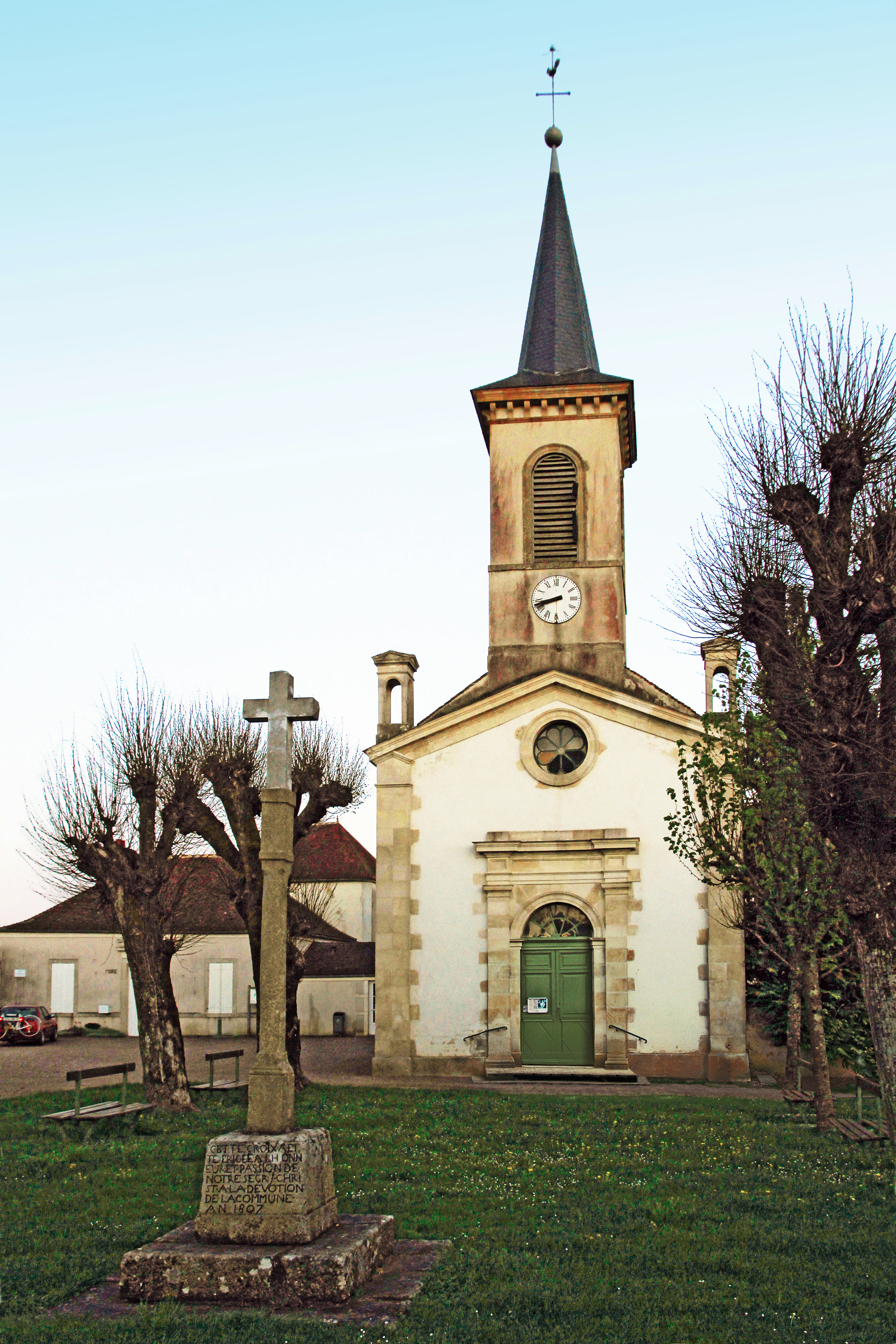 Église Saint-Jean-Baptiste de Courcelles-Frémoy